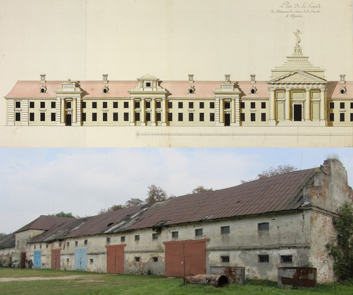 Беларуская (тарашкевіца): Маскалізацыя (русіфікацыя) Вялікага Княства Літоўскага. Места Высокае Берасьцейскага павету. Кляштар баніфратаў, помнік архітэктуры барока: аўтэнтычны выгляд і па частковым руйнаваньні савецкімі ўладамі